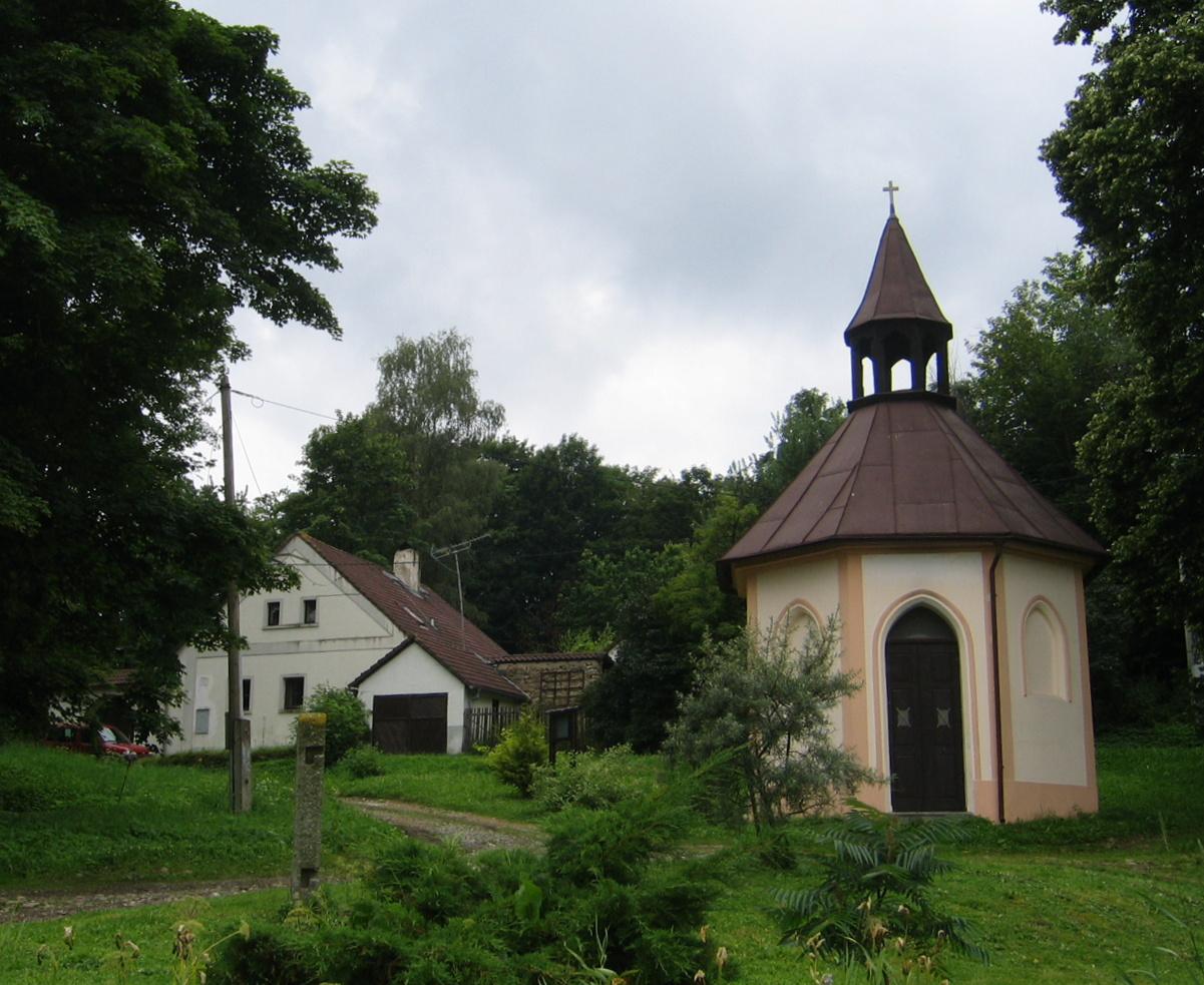 Kaple (Platoř), náves, Platoř.